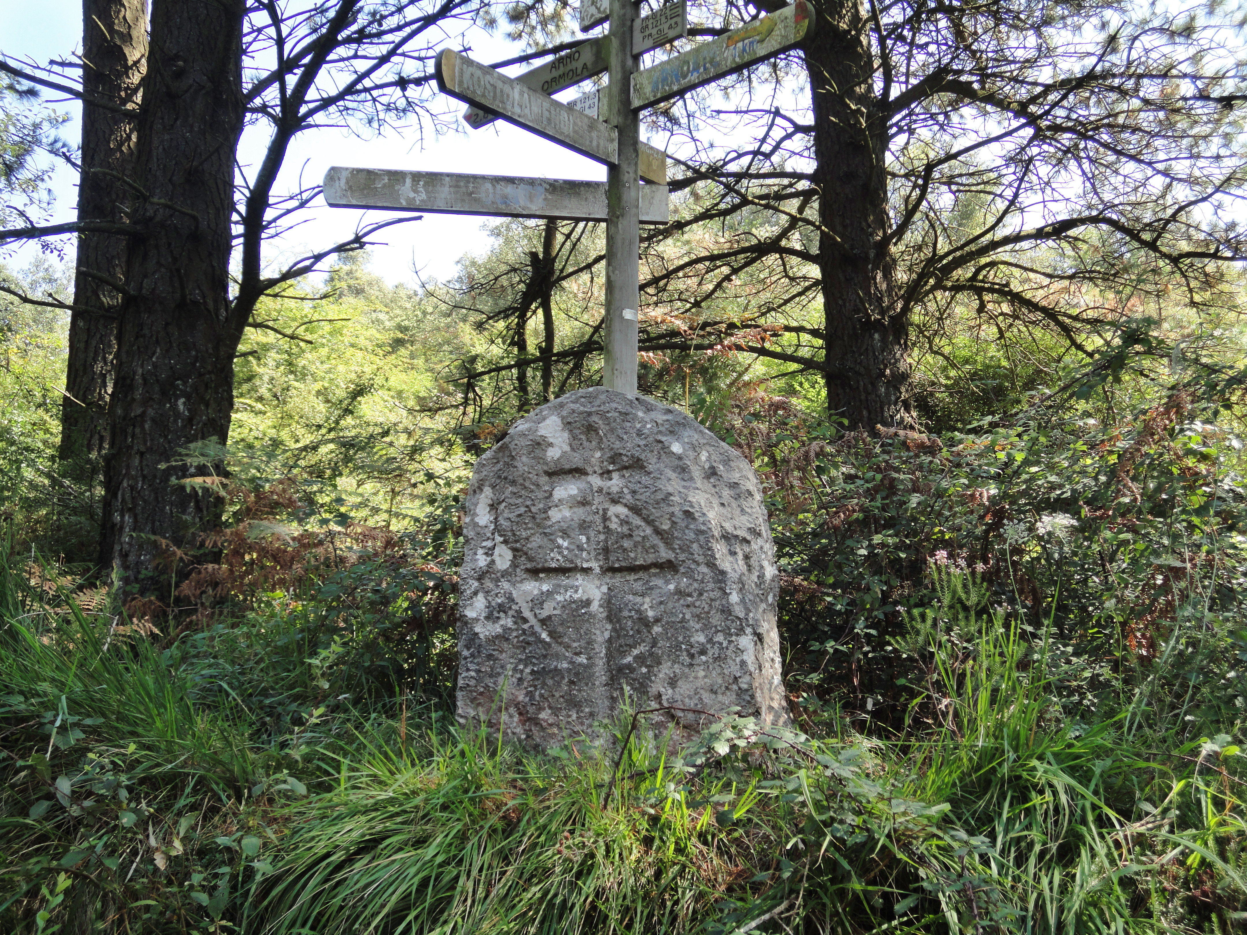 Ameikutz estela